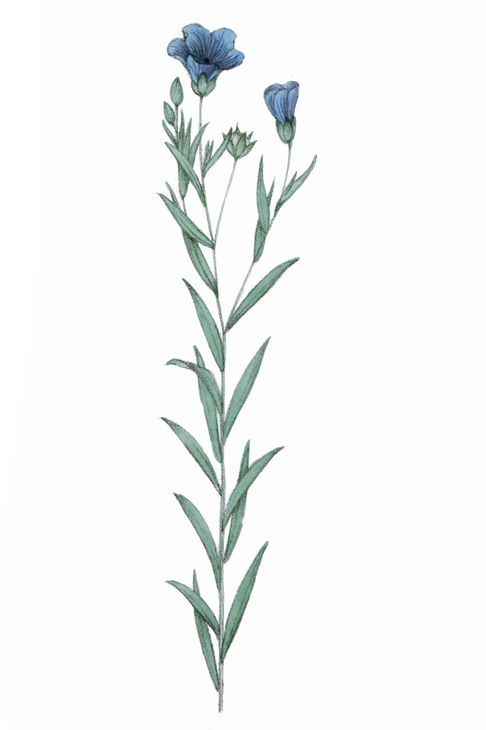 Dictionaire des plantes suisses 1853 Scanné par Utilisateur:Greatpatton